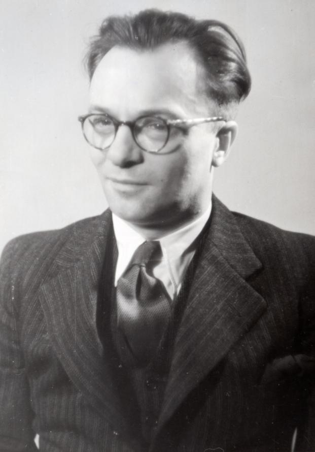 Journalist, verzetsman en politicus Frans (F.J.) Goedhart, o.a. P.v.d.A. - Kamerlid. Hij publiceerde onder pseudoniem Pieter 't Hoen. Nederland, ca. 1955.